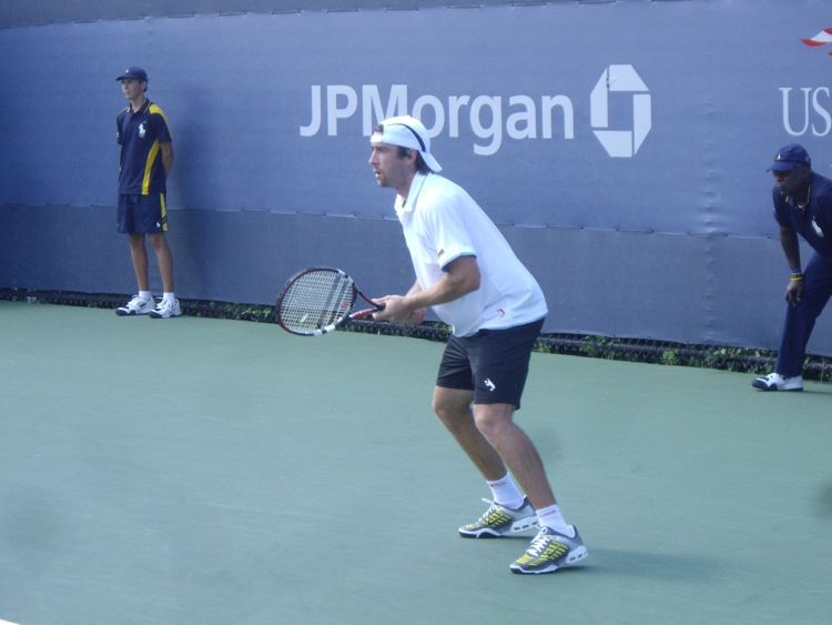 Benjamin Becker at 2007 US Open